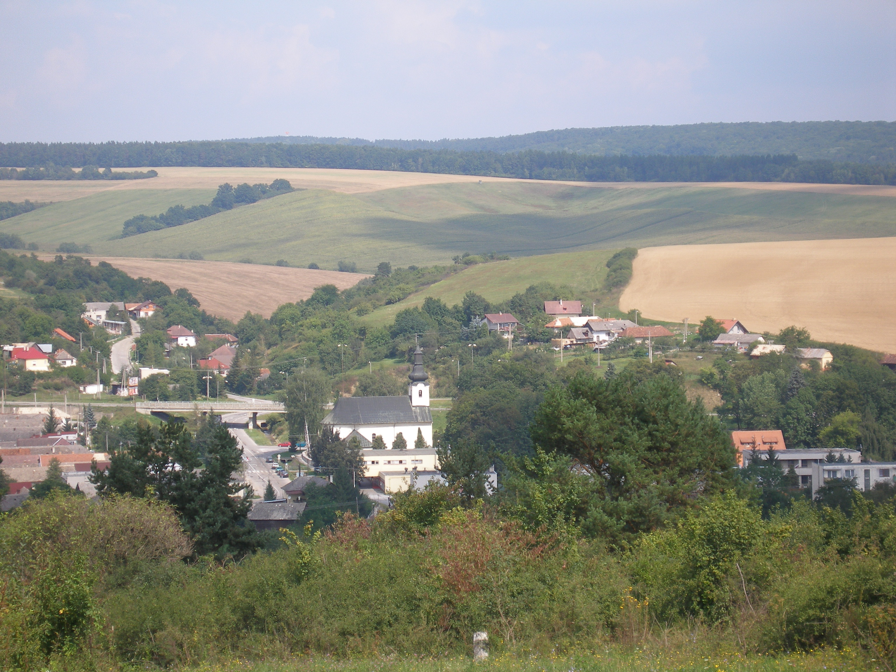 Šarišská obec Chminianska Nová Ves pohľad od Ondrášoviec